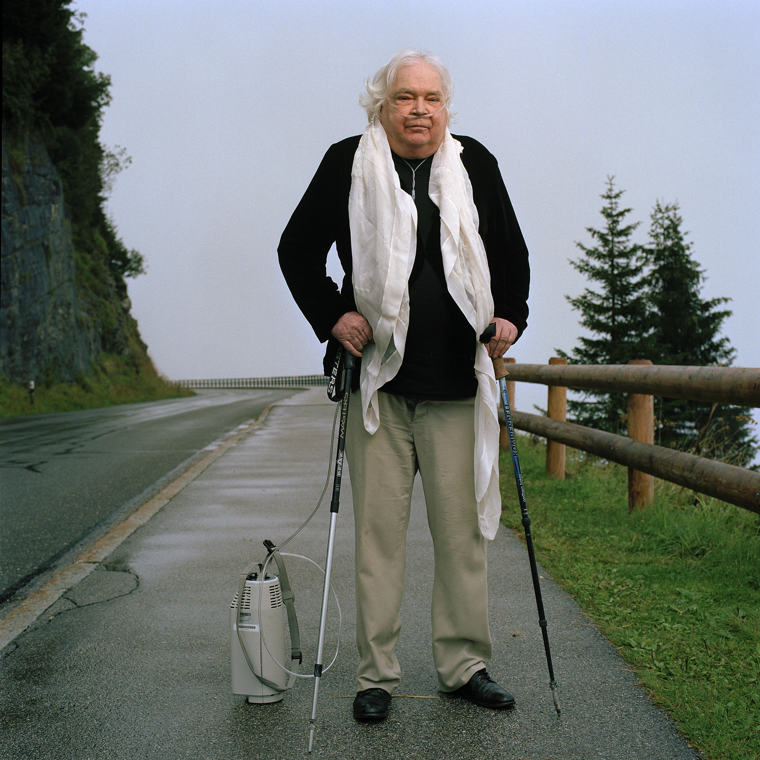 Thomas Harlan porträtiert von Oliver Mark im Berchtesgadener Land, 2007